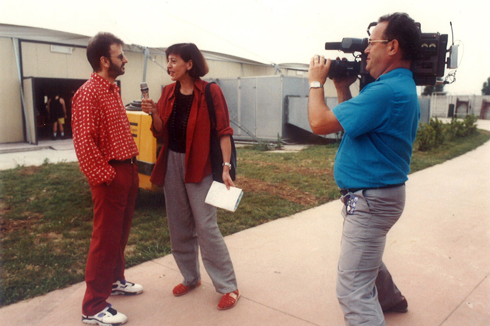 Brescia_luglio 1992 con Ringo Starr dei Beatles foto gramma di Rolando Giambelli_Brescia